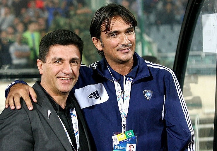 دیدار برگشت تیم های فوتبال استقلال - الهلال عربستان در مرحله گروهی لیگ قهرمانان آسیا ۲۰۱۳